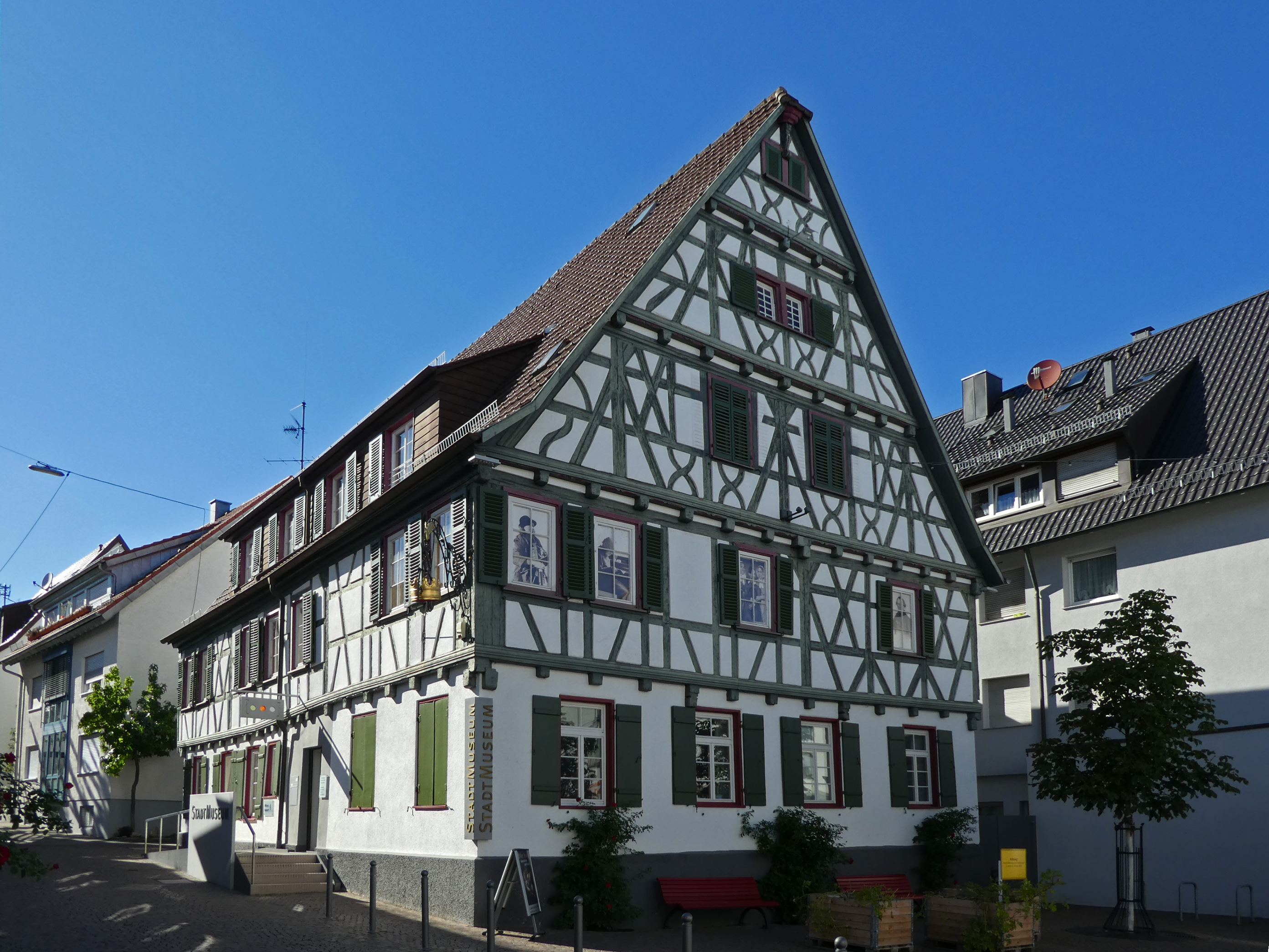 Stadtmuseum in Fellbach, Hintere Straße 26